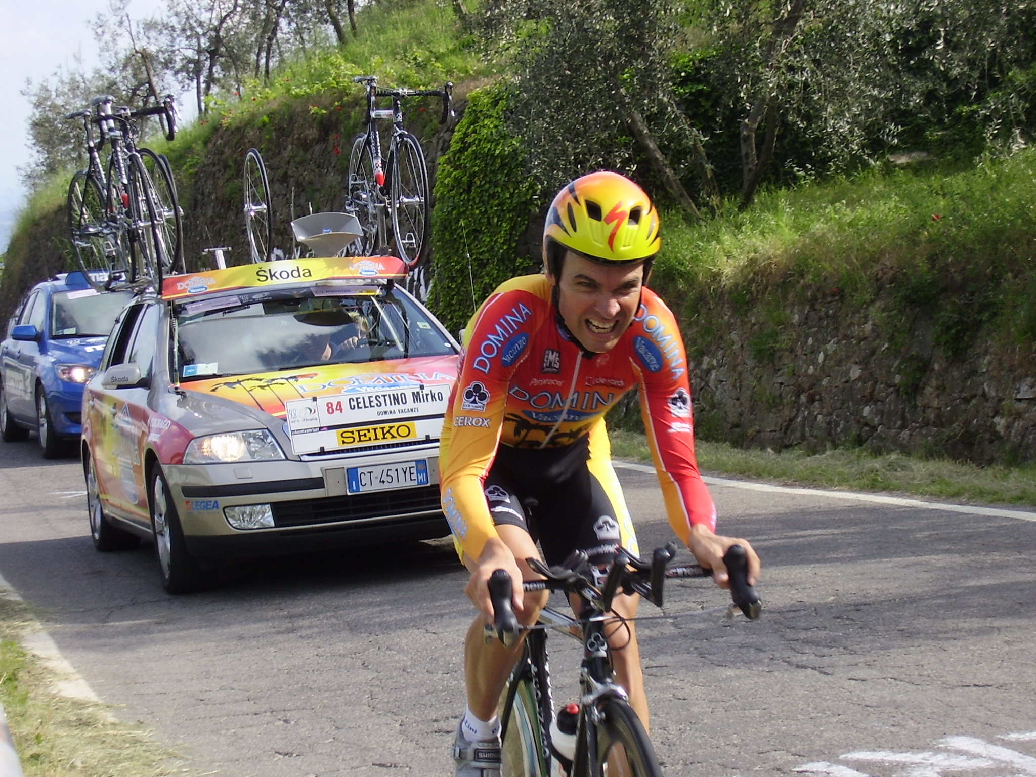 88 Giro d'Italia, Tappa a cronometro Lamporecchio Firenze - Celestino